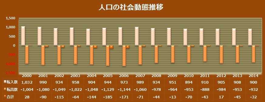 2000年以降における見附市の社会動態推移